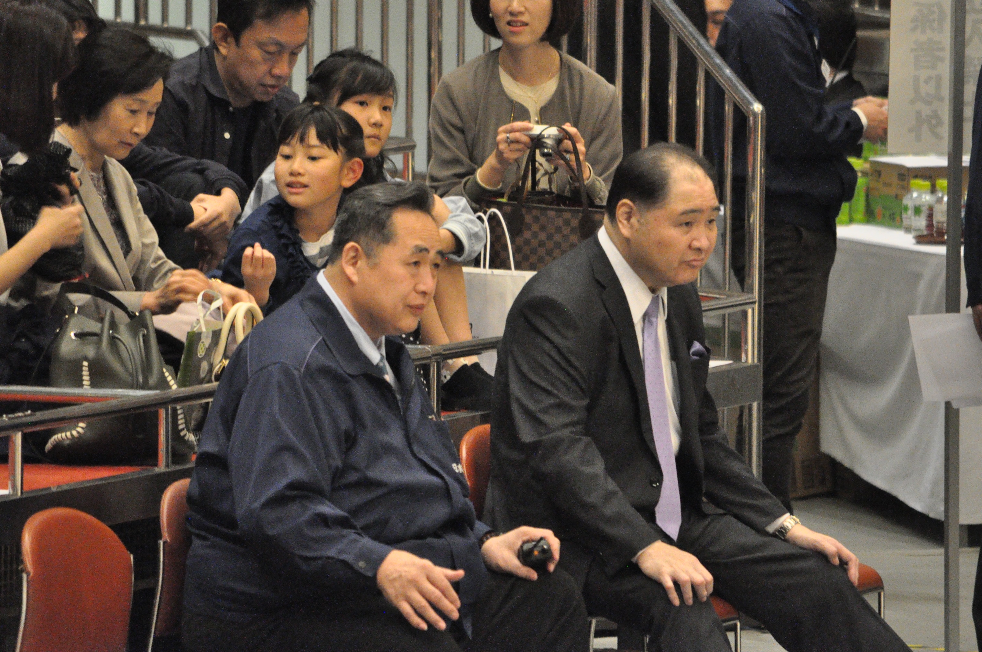 横綱稽古総見